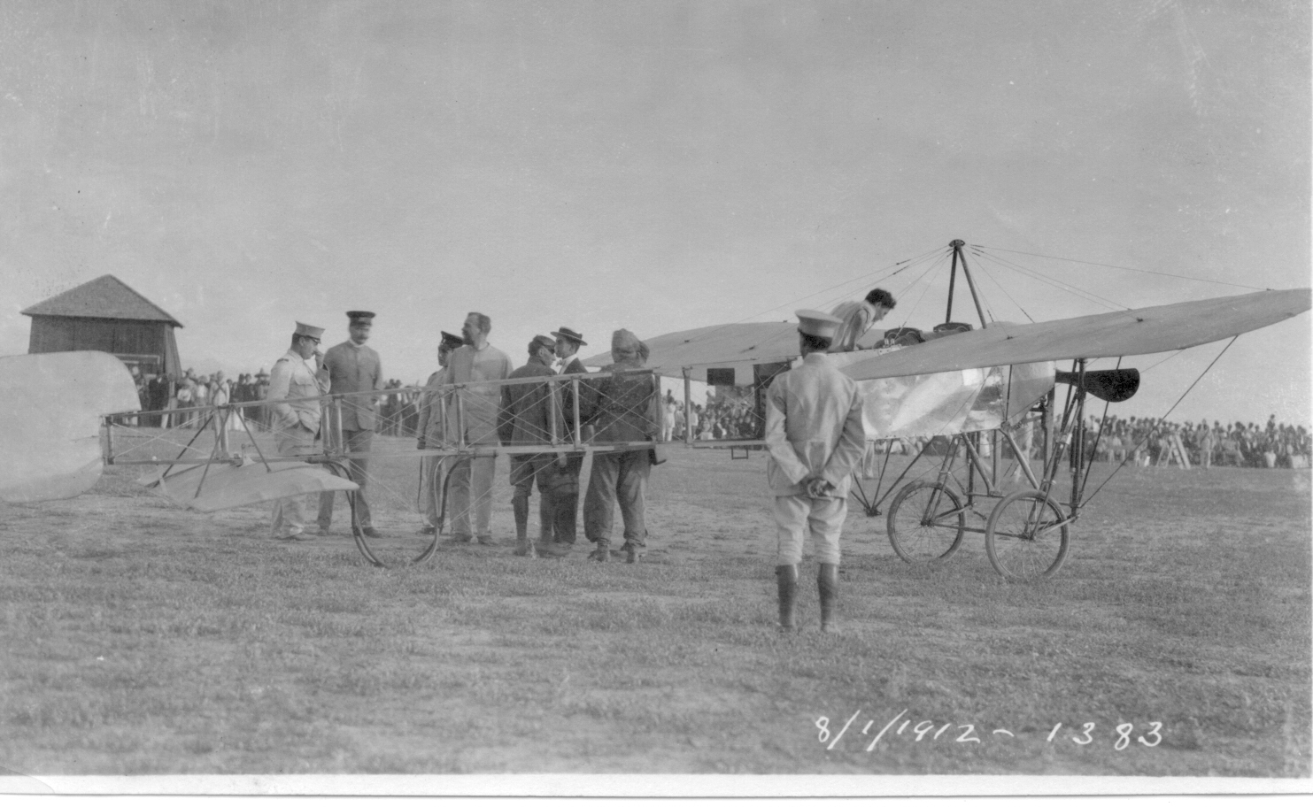 Aeroplano Bleriot XI piloteado por John Héctor Worden y Francisco Alvarez en Torreón el 1/ago/1912